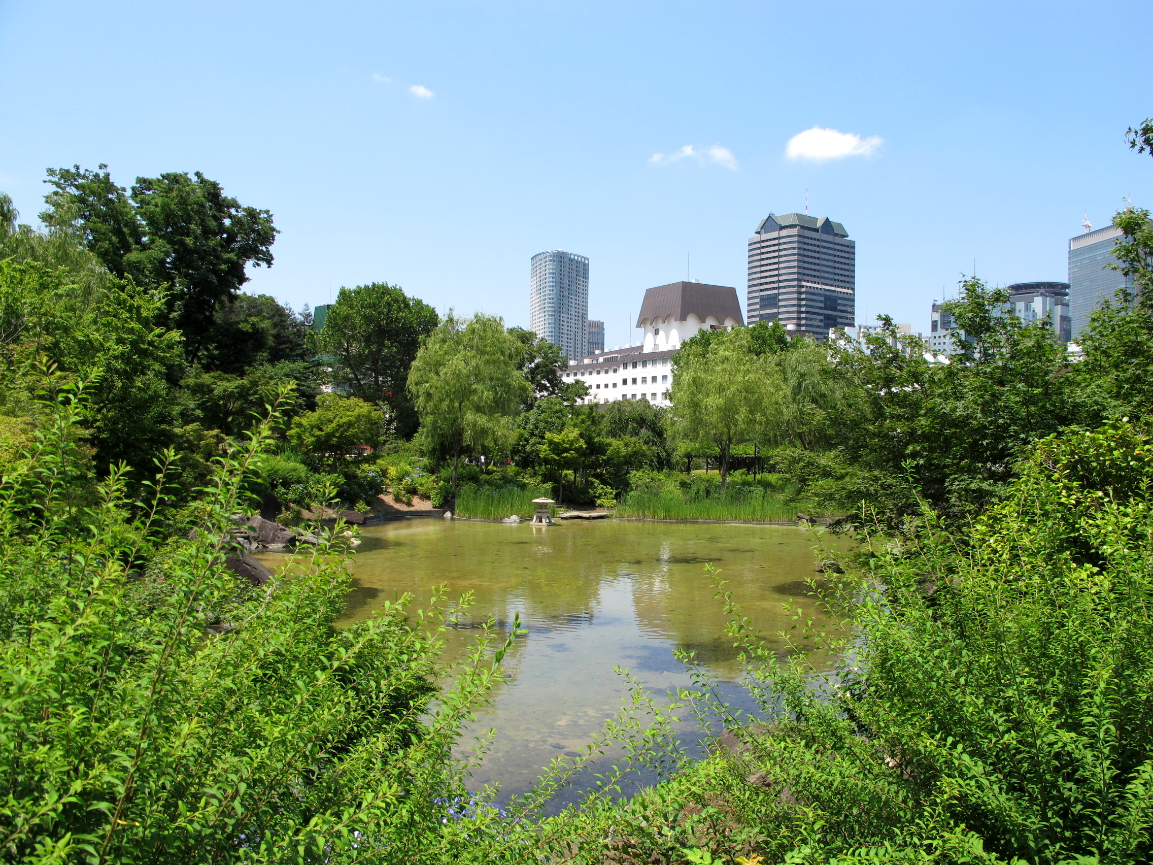 Hinokicho Park Pond